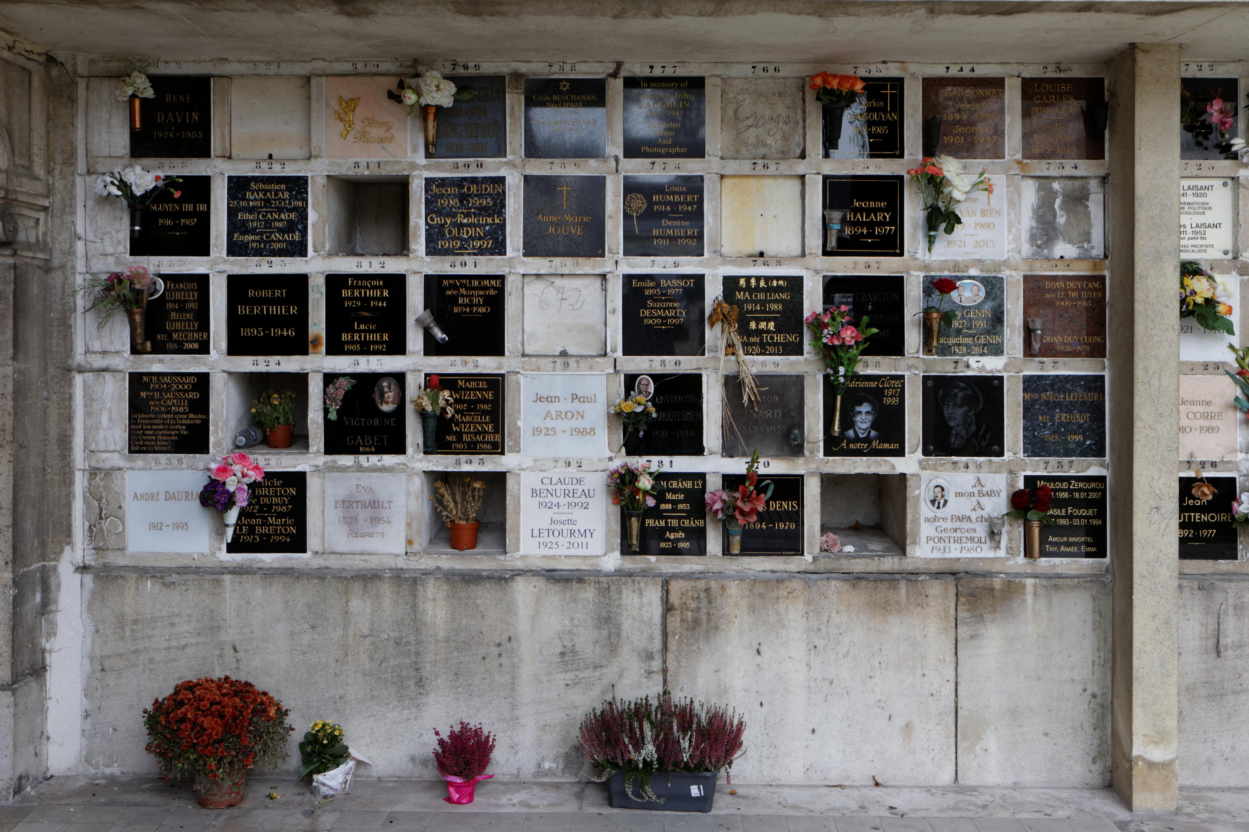 Cases du columbarium du cimetière du Père-Lachaise.